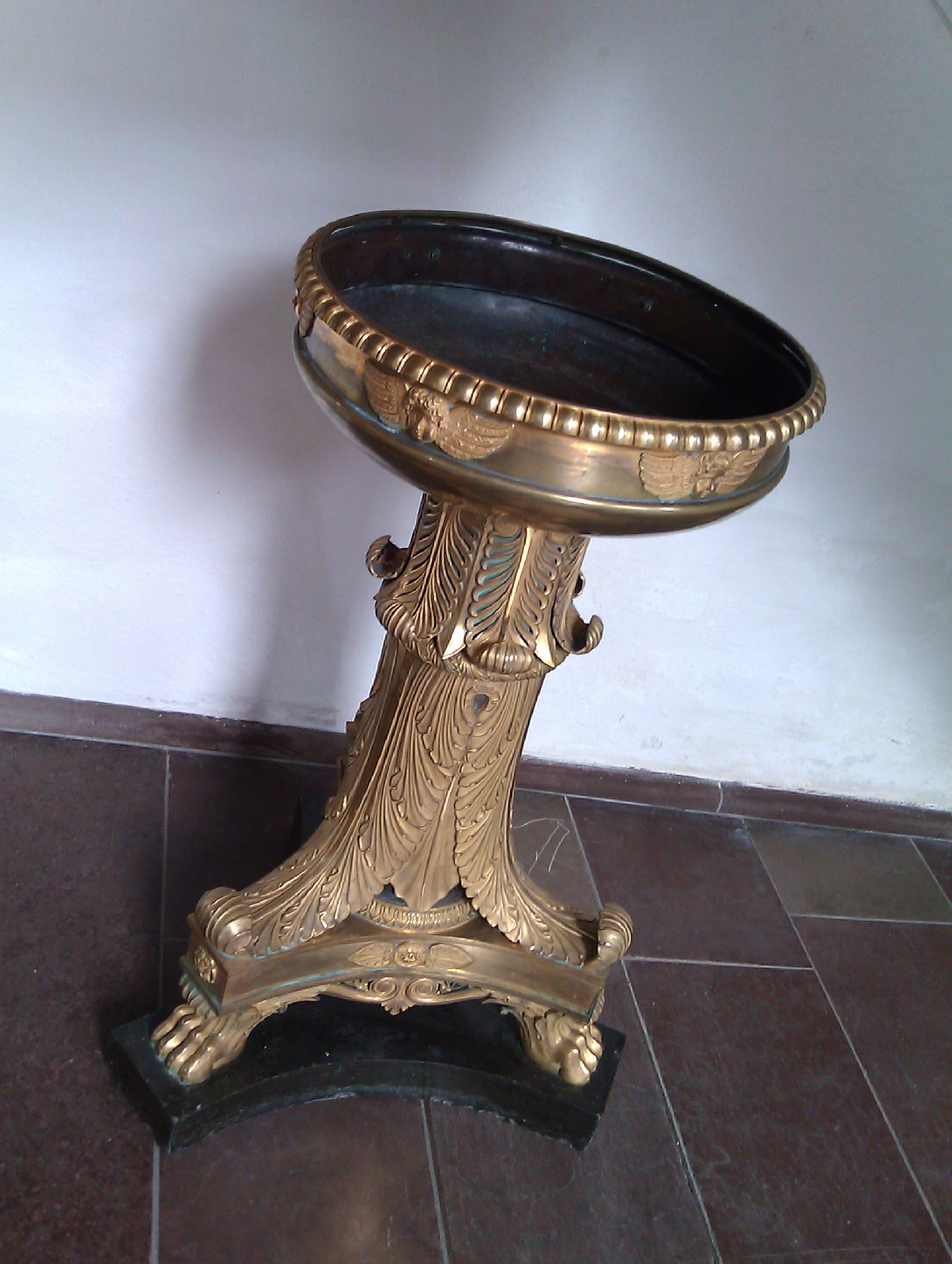 Døbefont, Sankt Petri Kirke, København